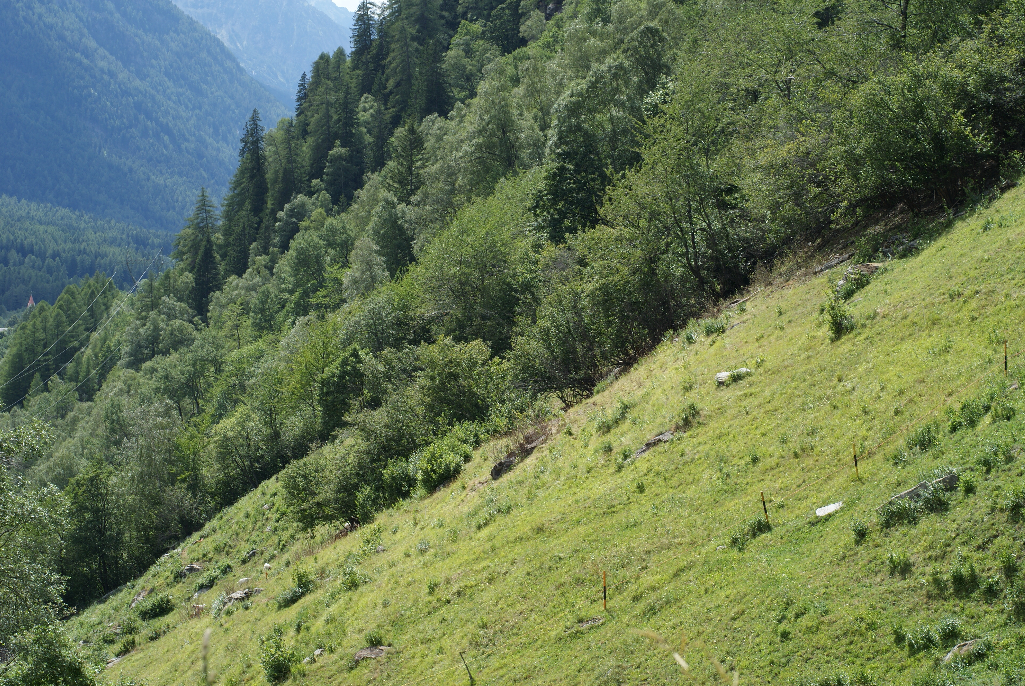 Verbuschung, unter anderem durch Grünerlen (Alnus viridis), bei Roticcio in Vicosoprano.